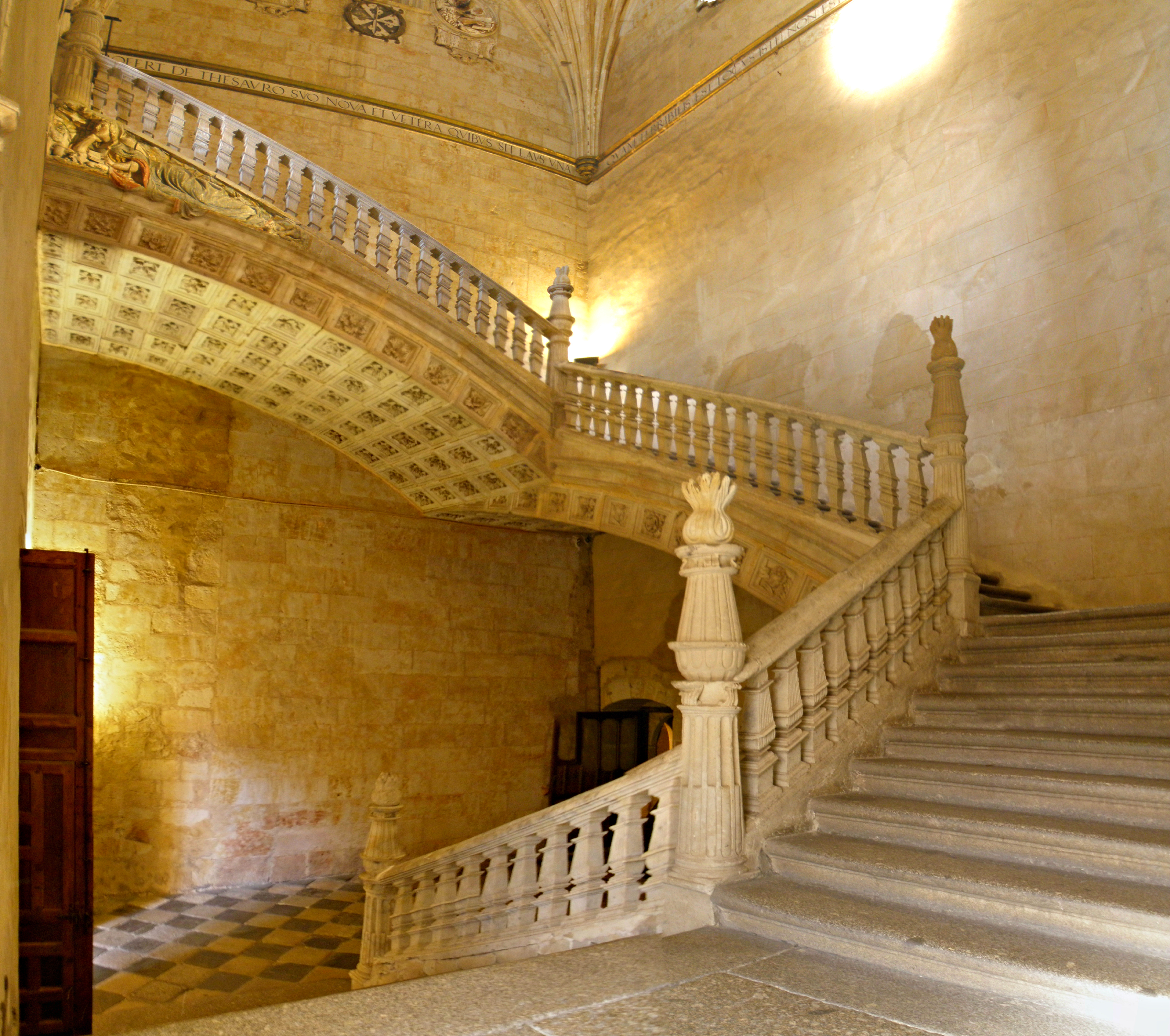 Escalera de Soto, convento de san Esteban de Salamanca